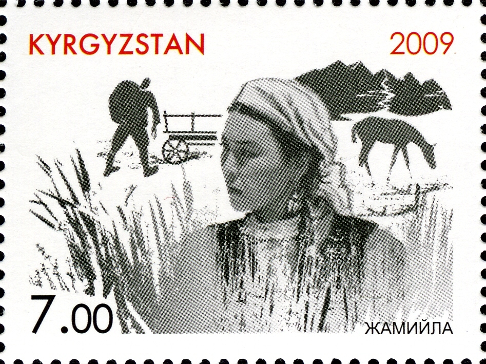 «Chyngyz Aitmatov and his arts» 577-584, number by Kyrgyz catalogue